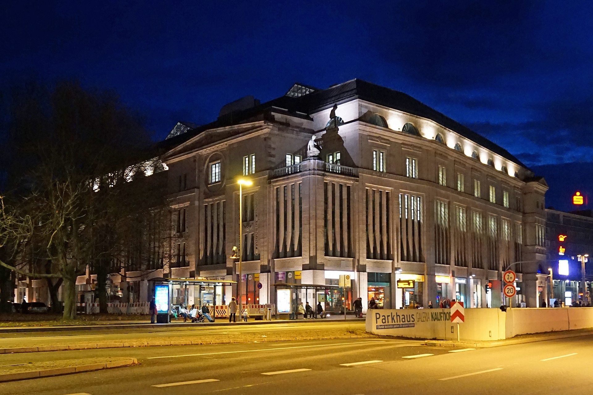 Das Kulturkaufhaus DAStietz in Chemnitz an der Bahnhofstraße, 2015